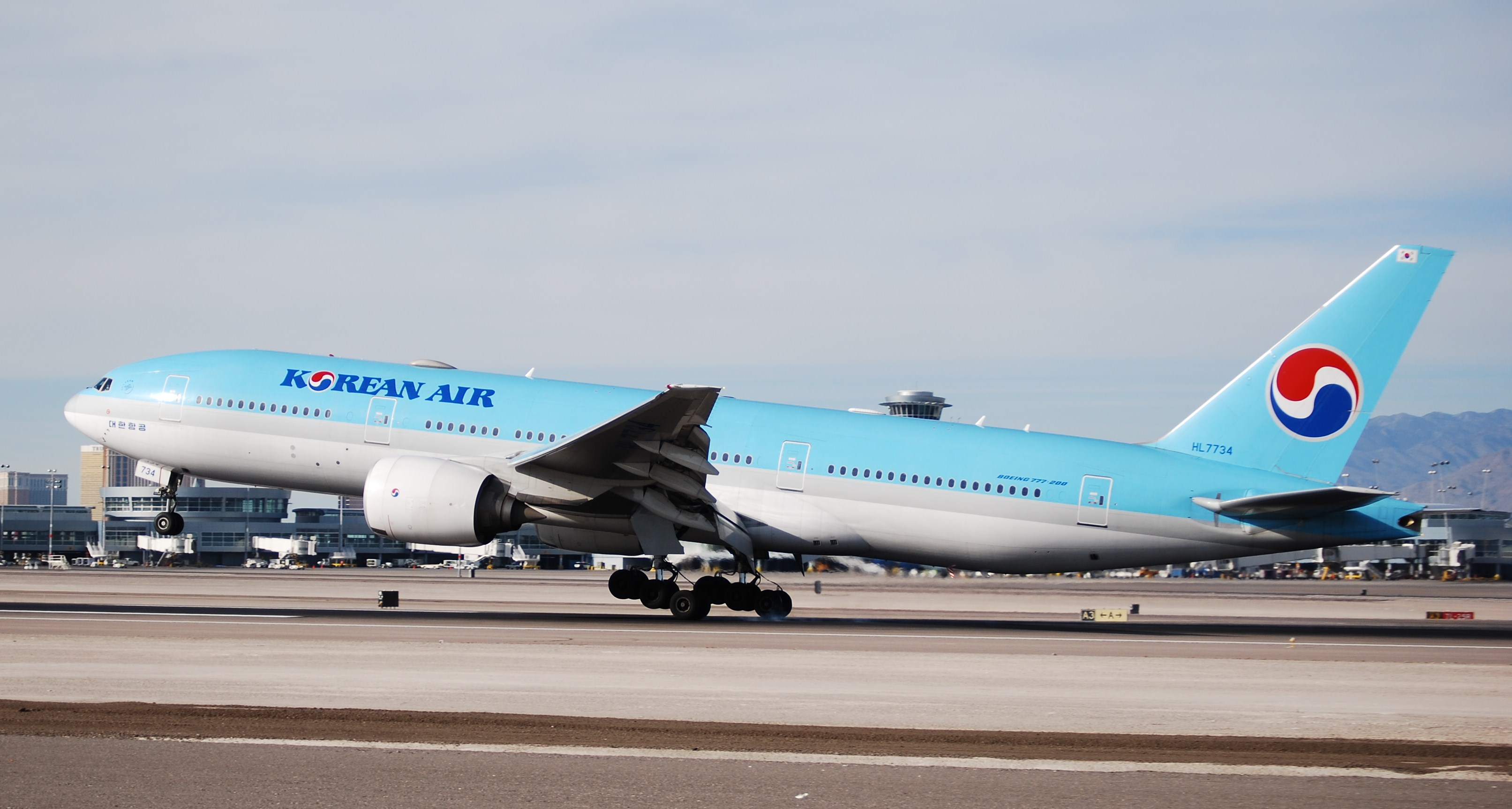 KAL 772